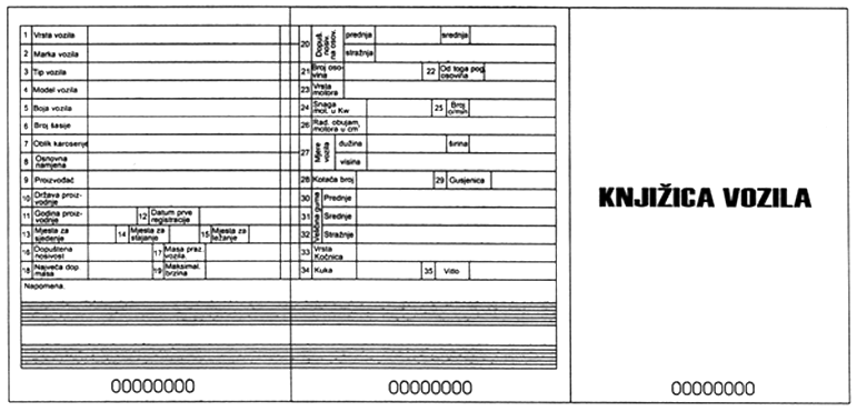 Izgled prednje strane knjižice vozila